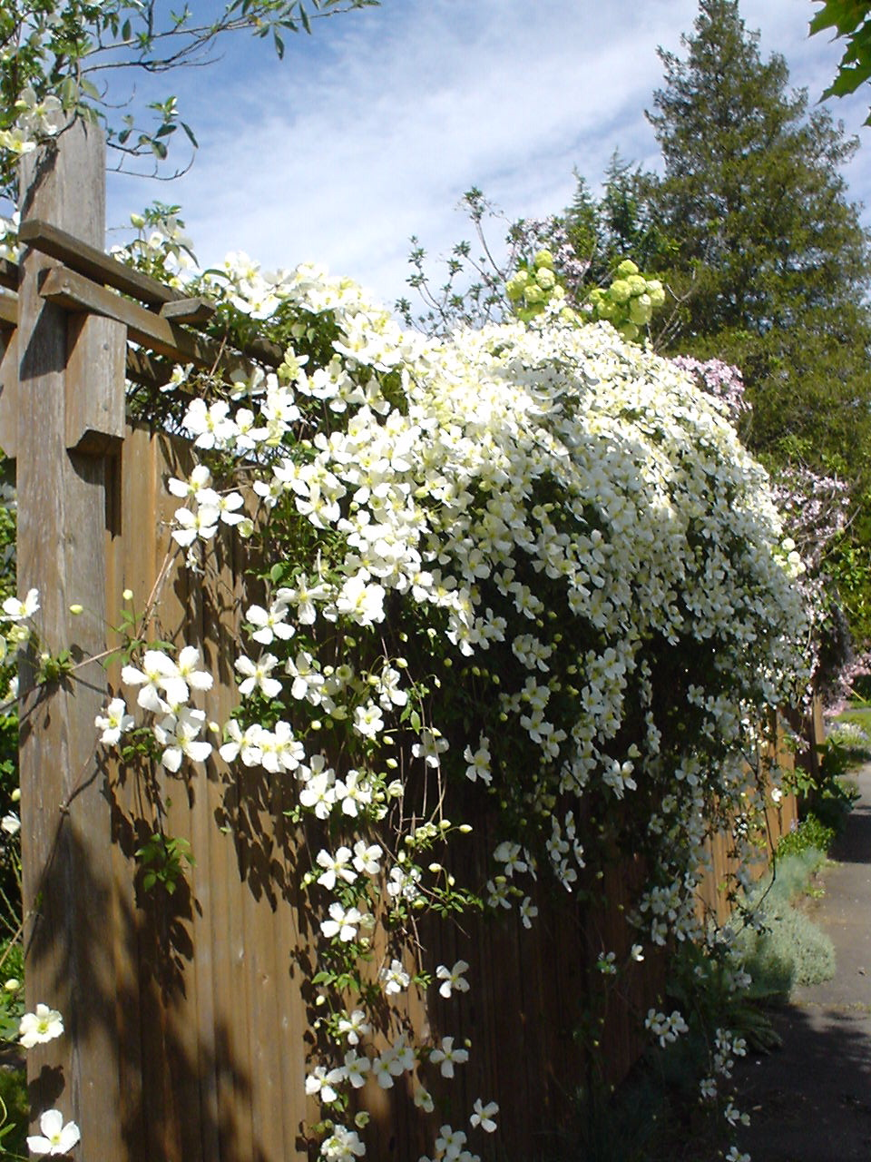 Montana clematis